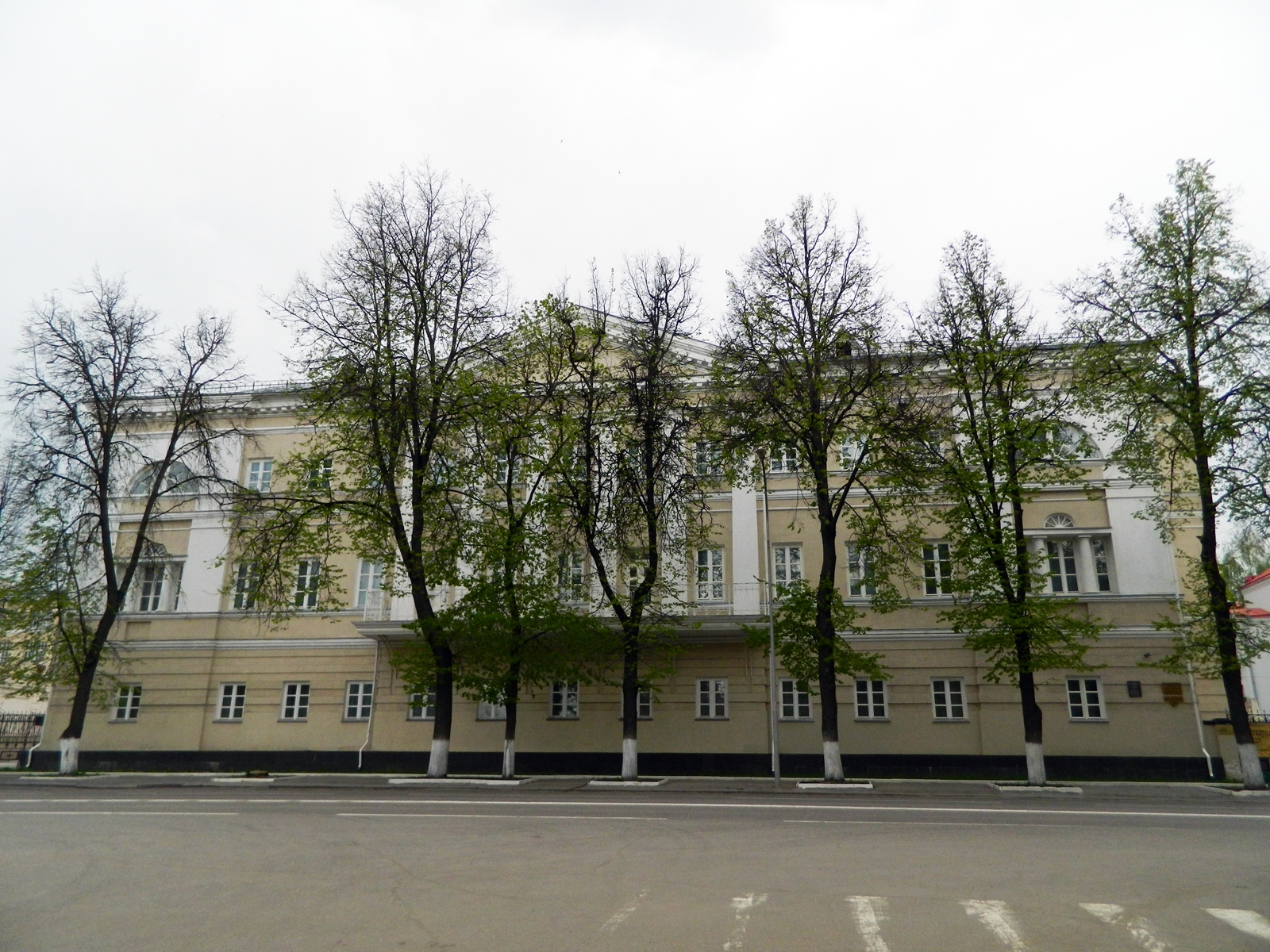 Губернаторский дом (Пенза)